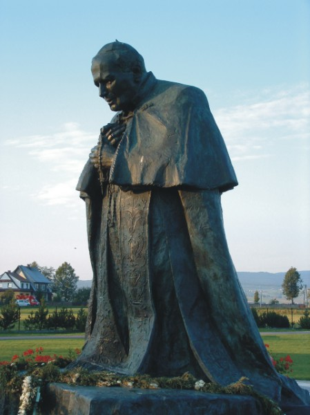 Pomniki papieża Jana Pawła II w Ludzimierzu